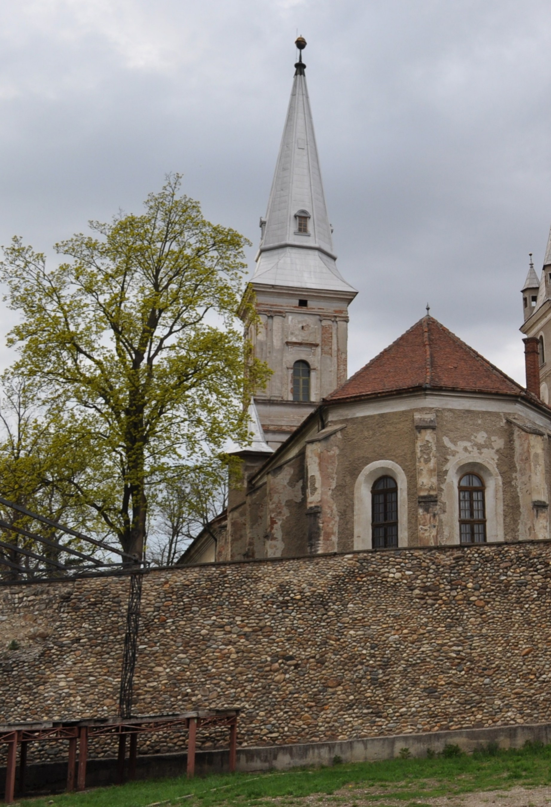 Biserică reformată